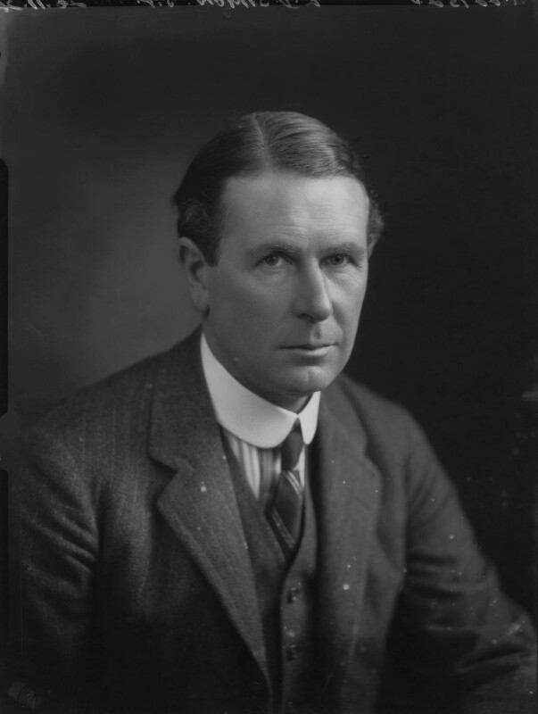 Lord Simon